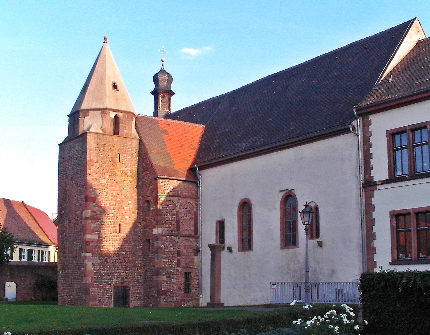 Ladenburg, Sebastianskapelle von Norden